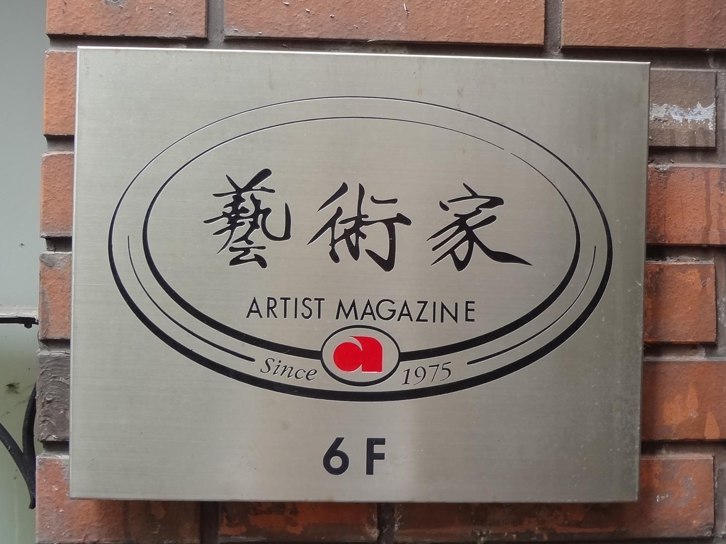 中文（台灣）: 藝術家雜誌社銘板，位於臺北市中正區重慶南路一段147號（東華大樓）1樓外牆。